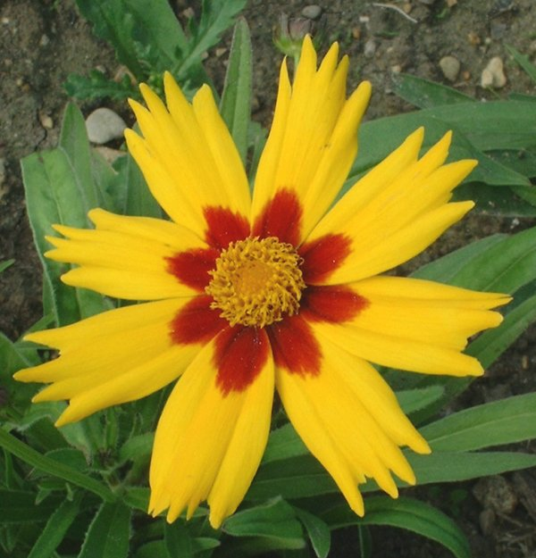 coreopsis grandiflora « Heliot », esplanade Milne-Edwards, Jardin des Plantes de Paris